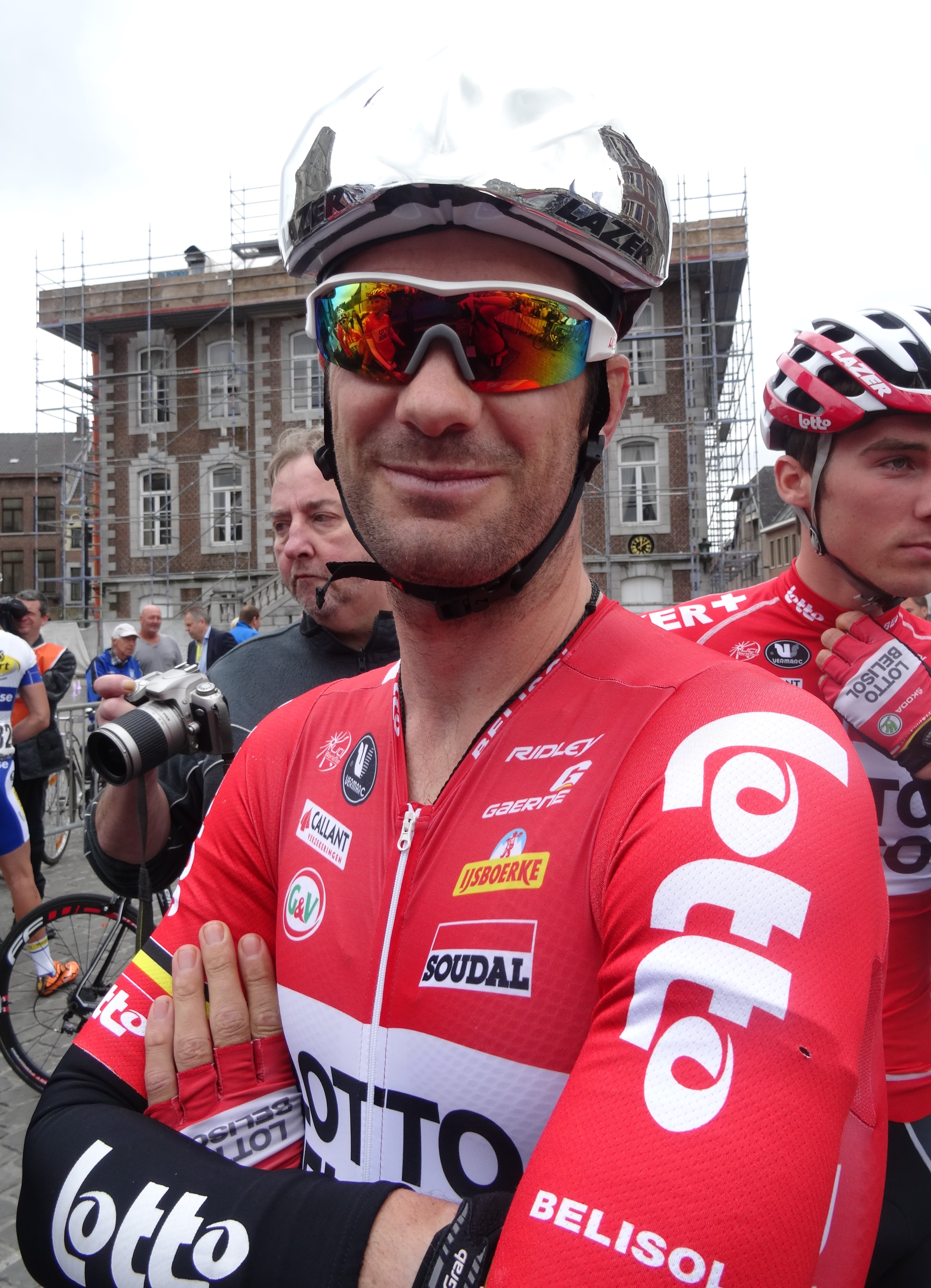 Reportage photographique réalisé le dimanche 15 juin à l'occasion du départ et de l'arrivée du Tour du Limbourg 2014 à Tongres, Belgique.